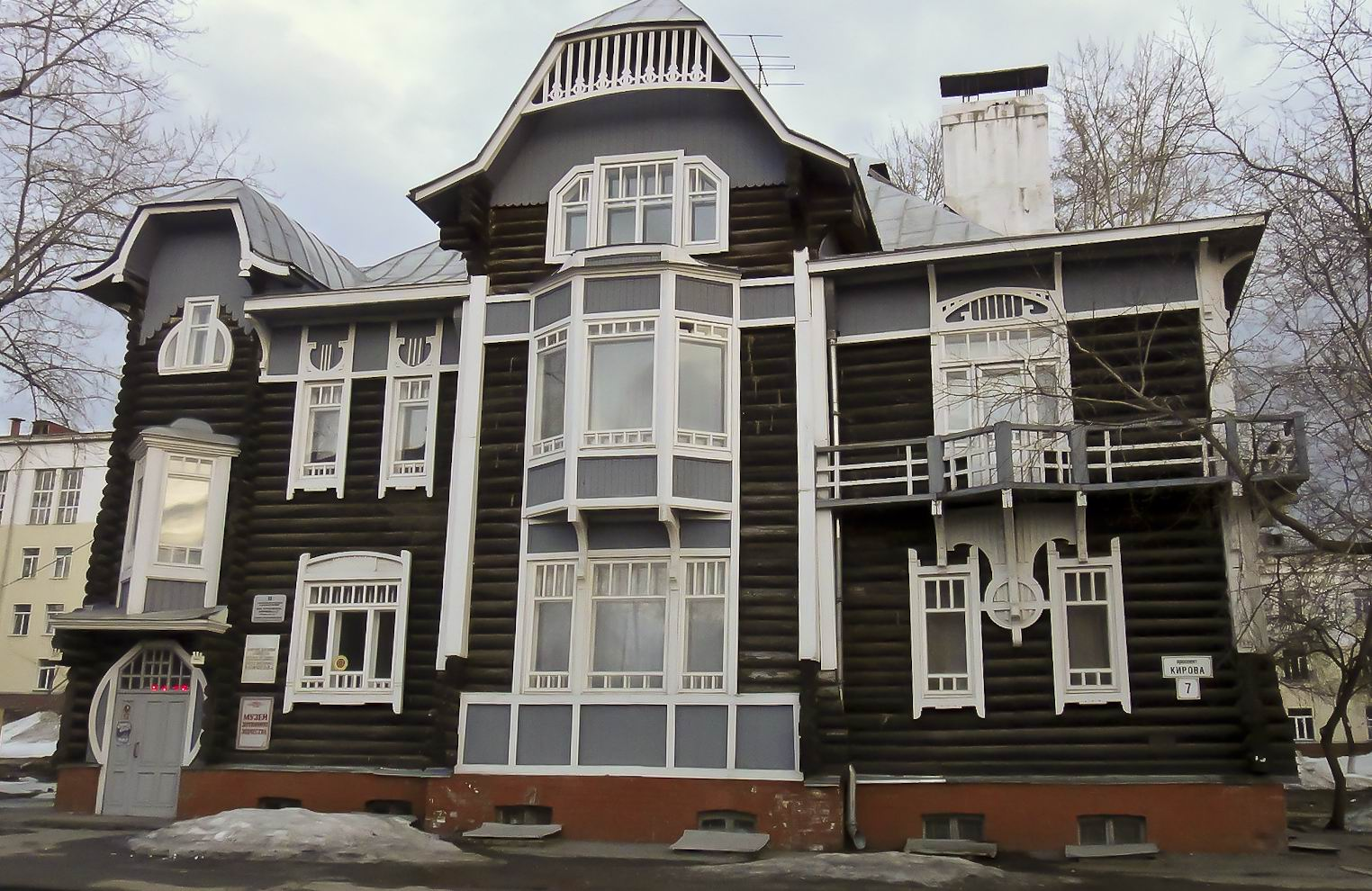 Собственный дом архитектора А.Д. Крячкова в Томске